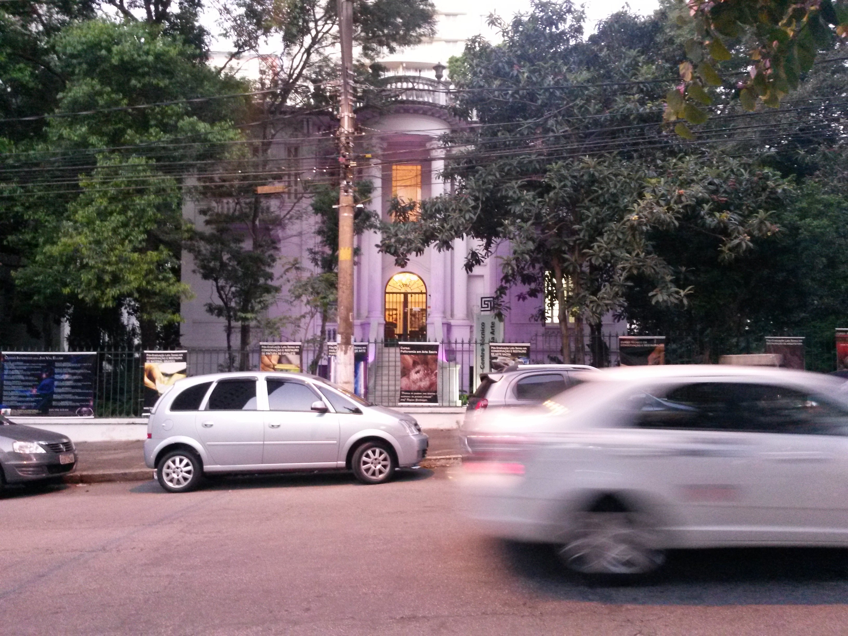 Árvores cobrem a fachada da Residência da Família Jafet na Rua Costa Aguiar, 1013 em São Paulo (SP), Brasil